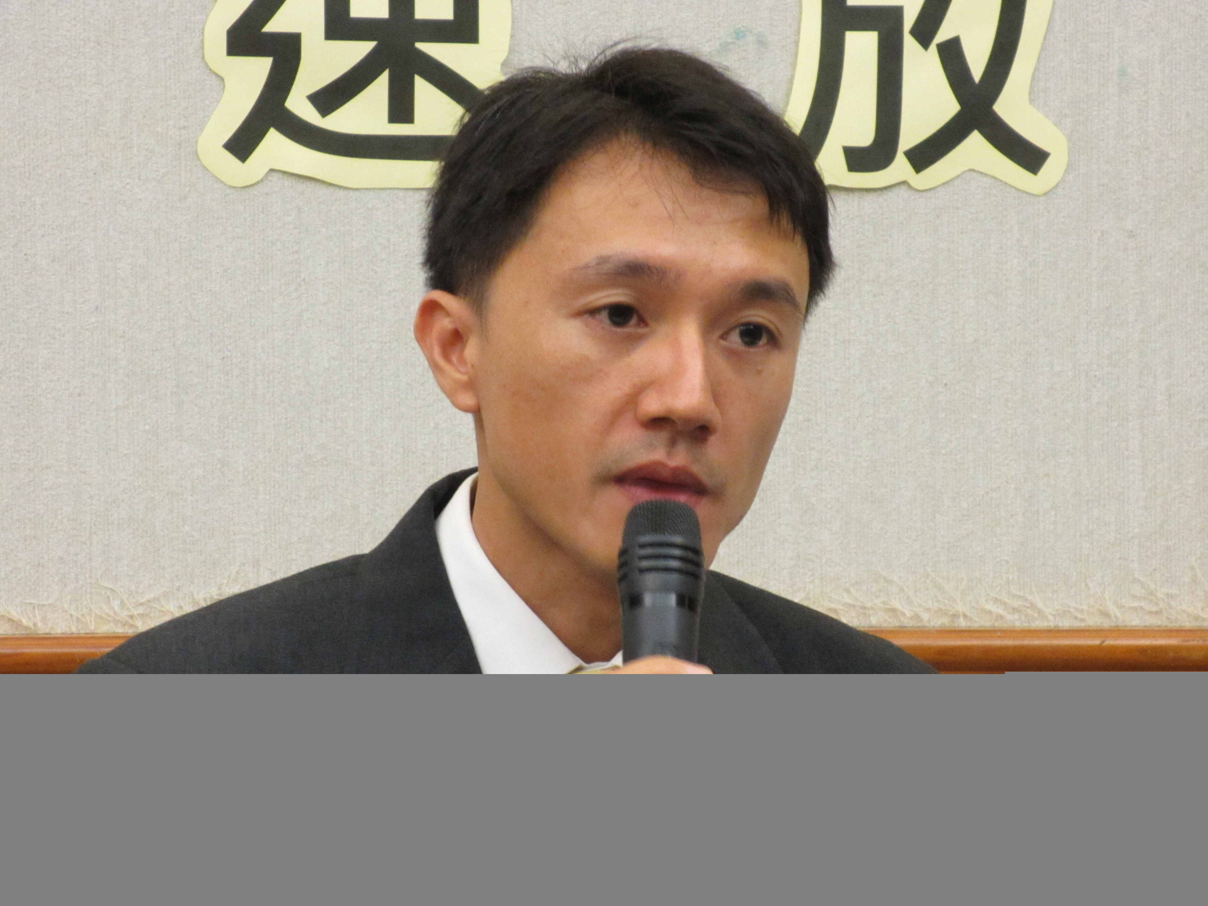 中文（台灣）: 大赦國際台灣分會秘書長楊宗澧(美國之音張永泰拍攝)